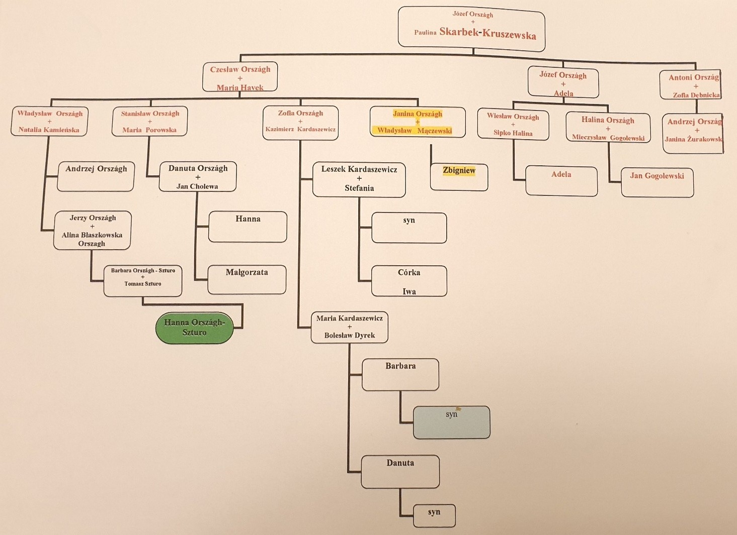 Rodzina Országhów